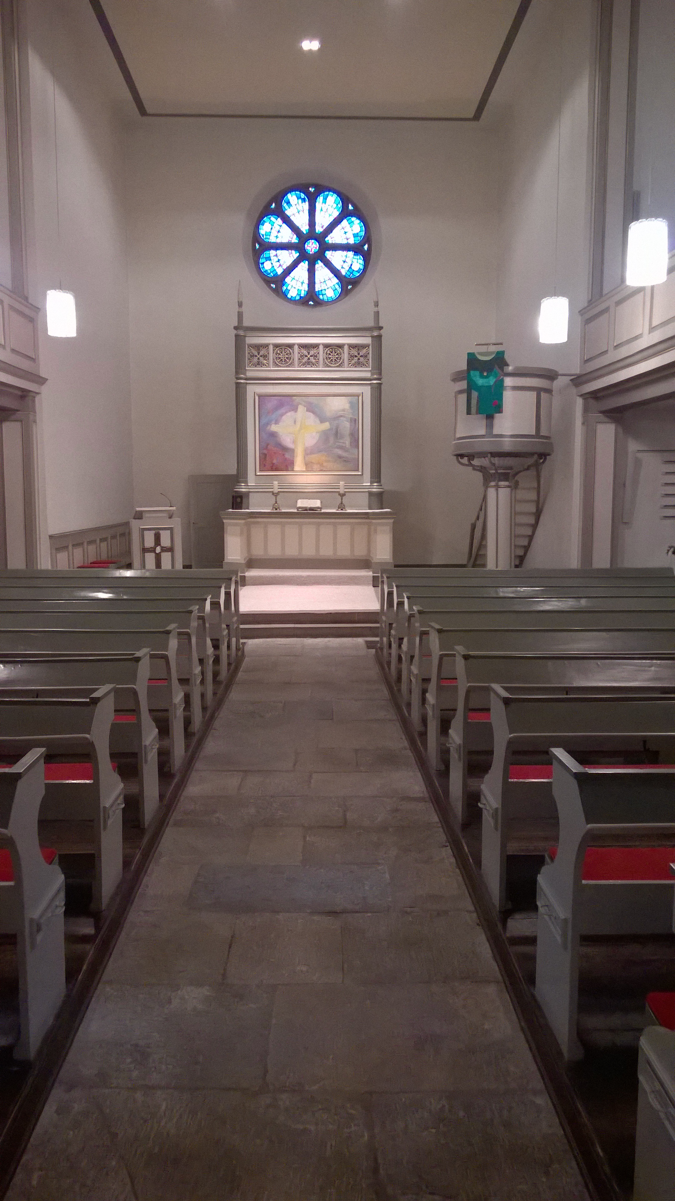 Alte Kirche Bönen, Innenraum, Blick zum Altar